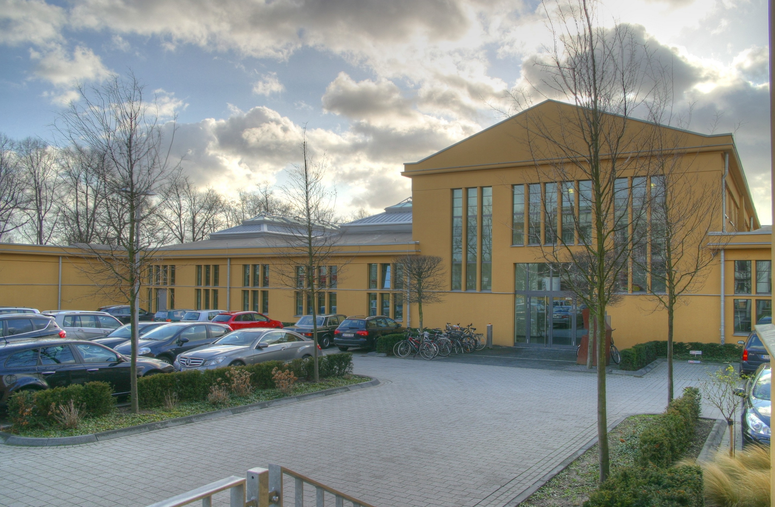 technisches Denkmal/ Fuhramt Vogelsanger Str. 321, Köln Bickendorf. Alte Wagenfabrik: Ansicht Innenhof This is a photograph of an architectural monument.